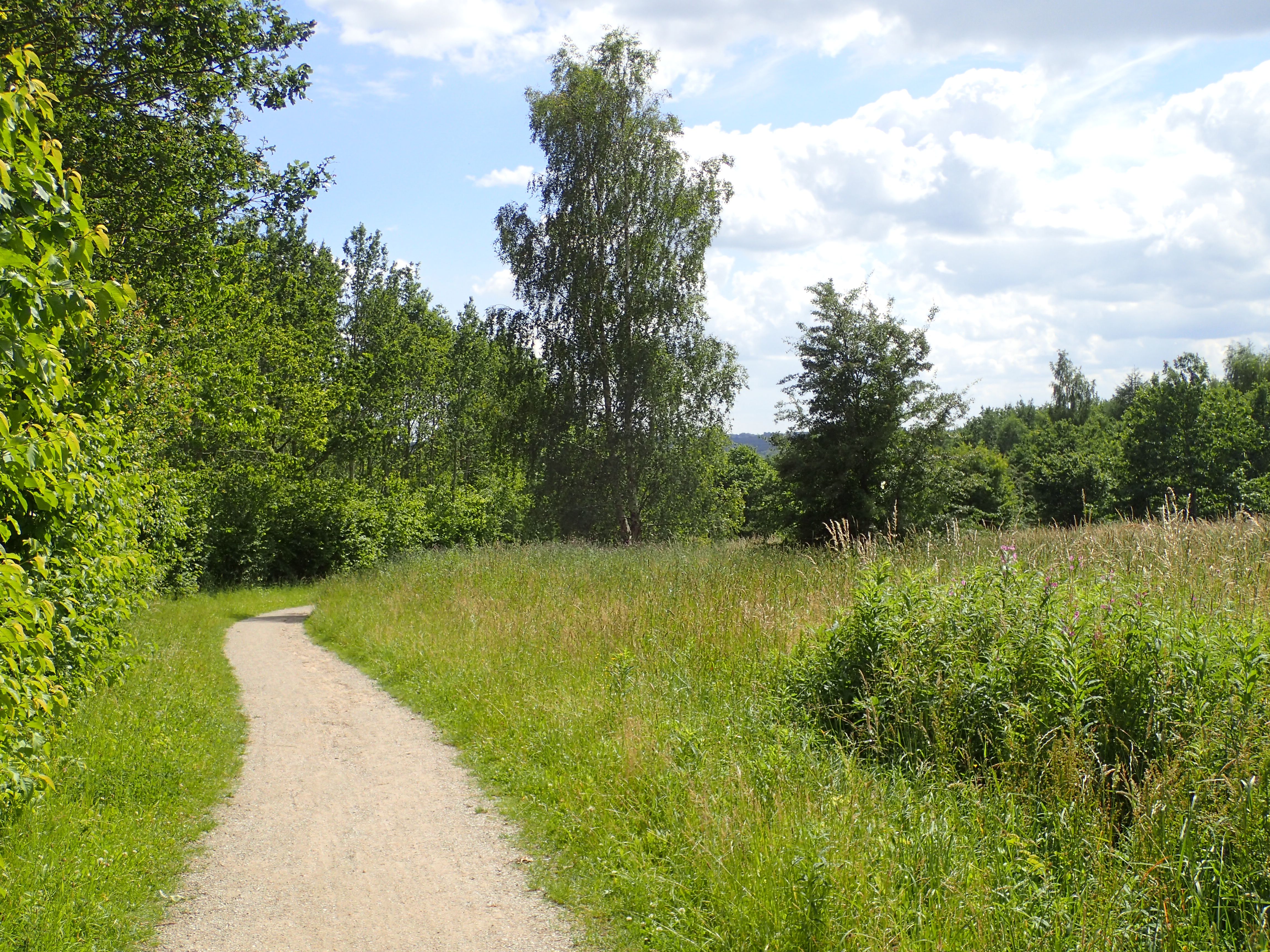 Sti gennem Gellerup Skov.